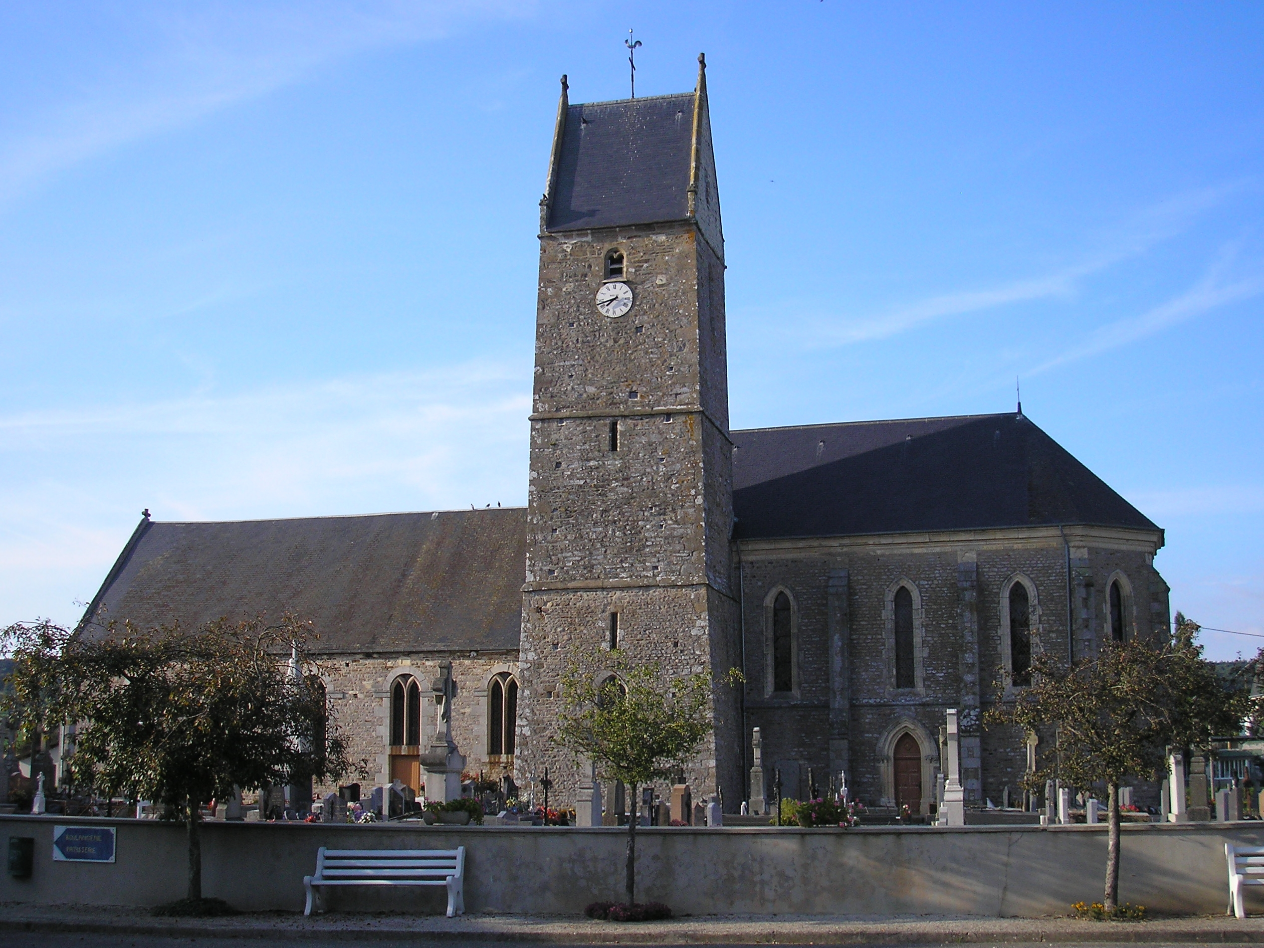 L'église de Montchamp (Normandie, France).